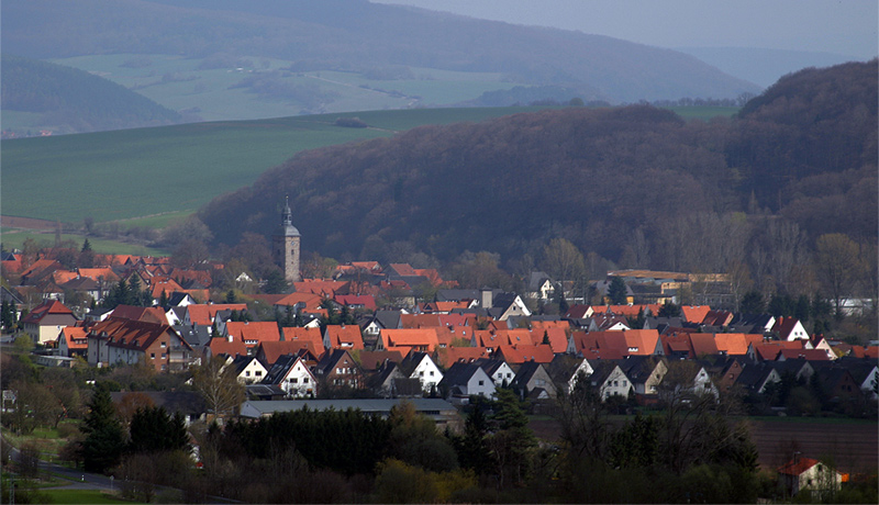 Blick vom Sudholz auf den Ort Hedemünden